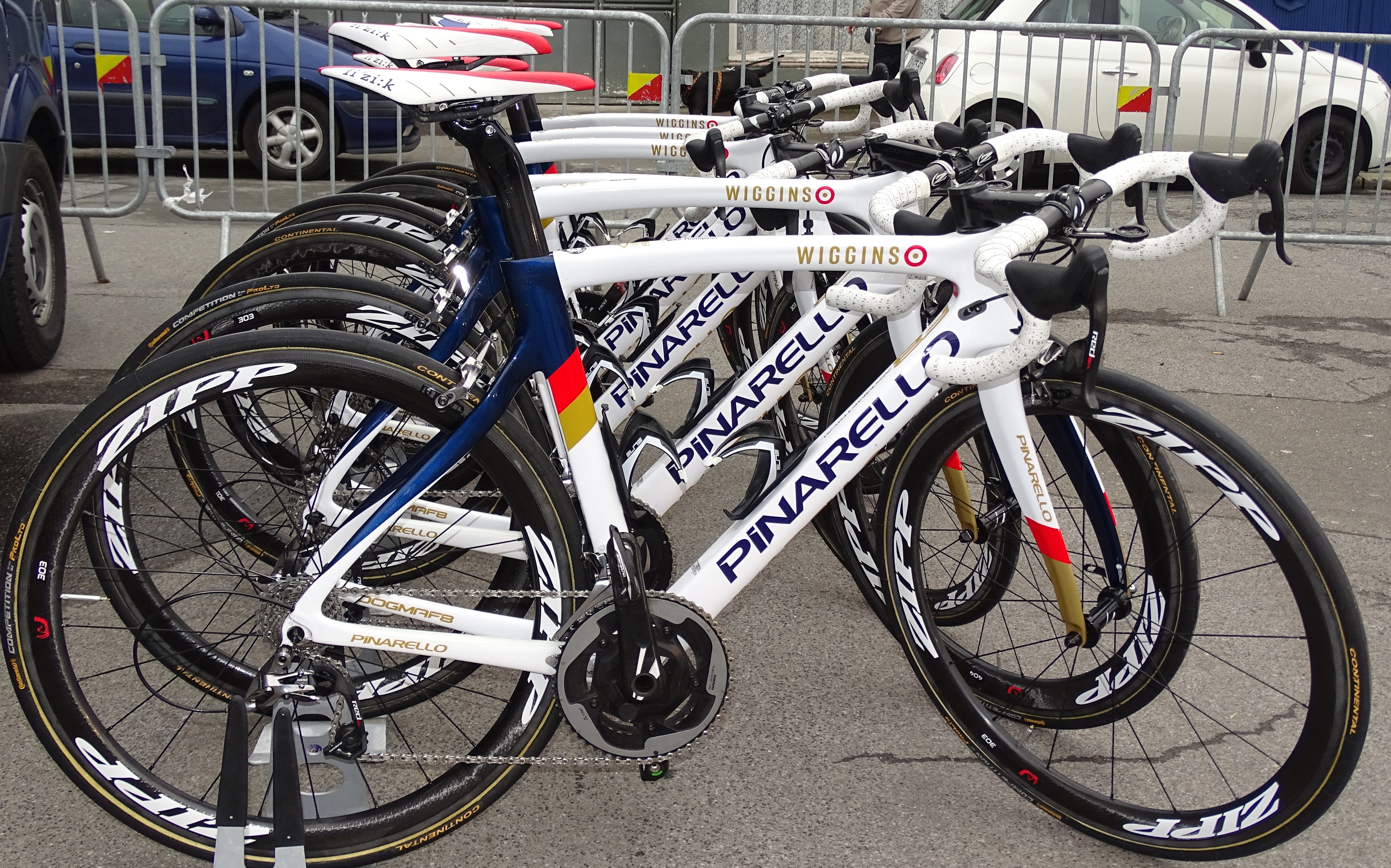 Reportage réalisé le dimanche 6 mars à l'occasion du départ et de l'arrivée du Grand Prix de Lillers-Souvenir Bruno Comini 2016 à Lillers, Pas-de-Calais, Nord-Pas-de-Calais, France.